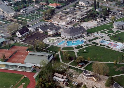 Tiszaújváros, Hungary, aerialphotgraphy